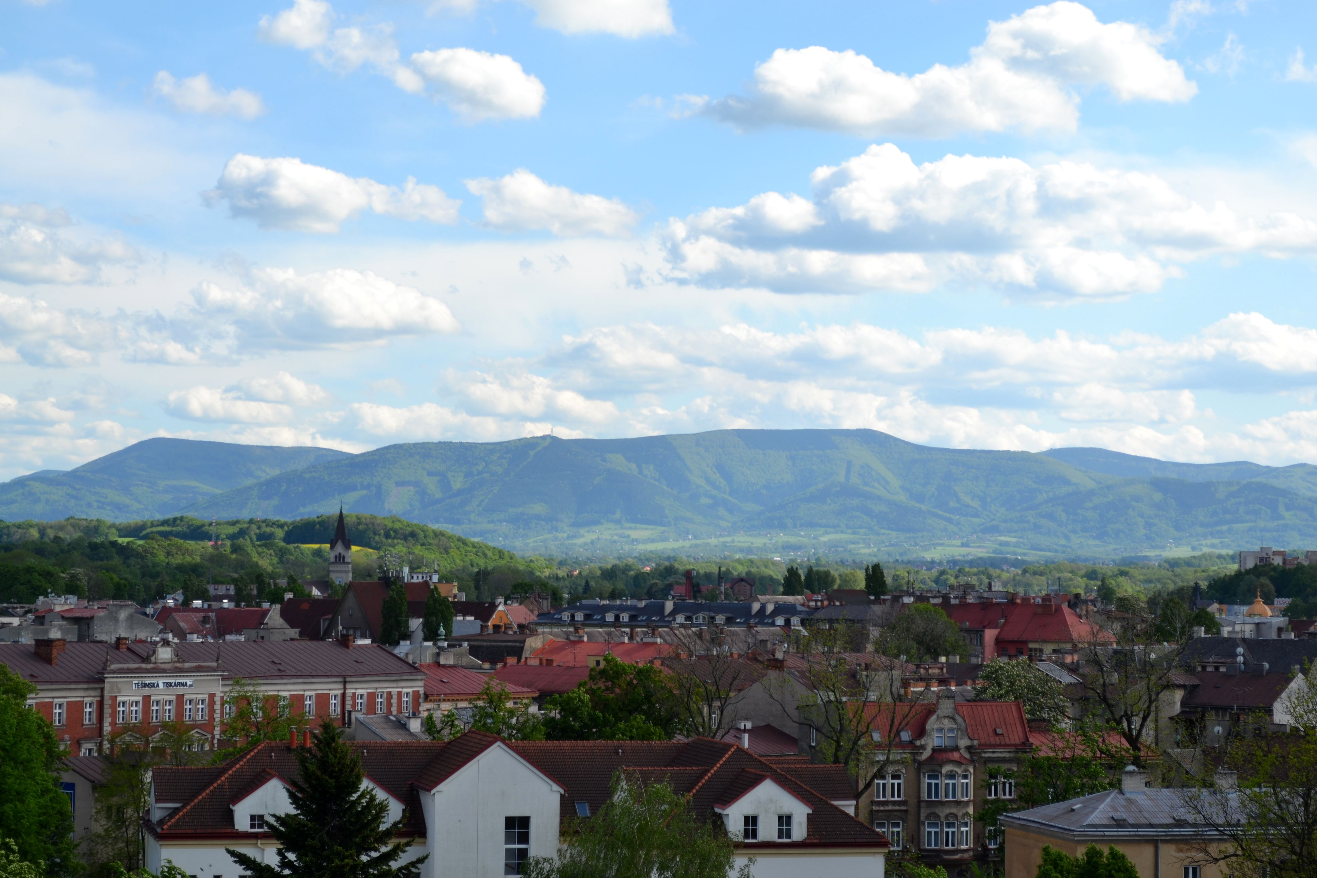 Cieszyn, układ urbanistyczny ze wzgórzem Zamkowym, XI-XX w.